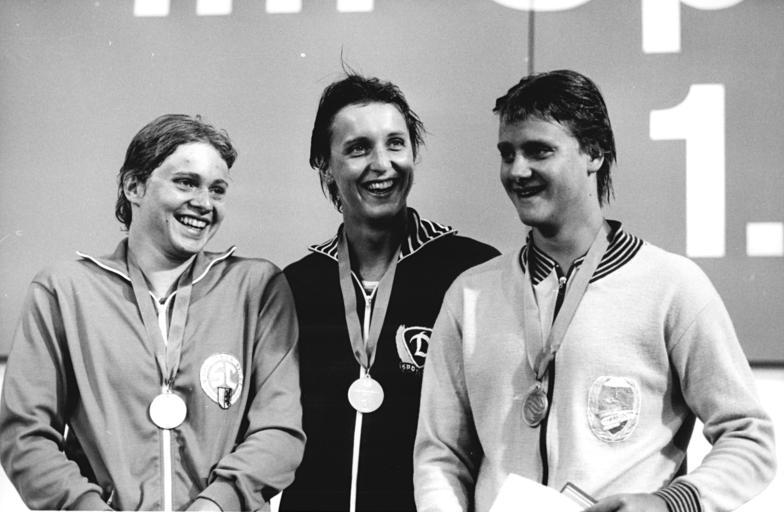 Barbara Krause, Petra Thümer, Karen Matschuk ADN-ZB.Link-02.07.87 Berlin: 29. DDR-Meisterschaften im Sportschwimmen- Barbara Krause schwamm Weltrekord- Freude über ihren Weltrekord über 200 m Freistil in 1:59,04 Min bei Barbara Kraus (SC Dynamo Berlin-Mitte). Zweite wurde Petra Thümer (SC Karl-Marx-Stadt-l.) vor Karen Matschuk (SC Ampor Rostock-r.)